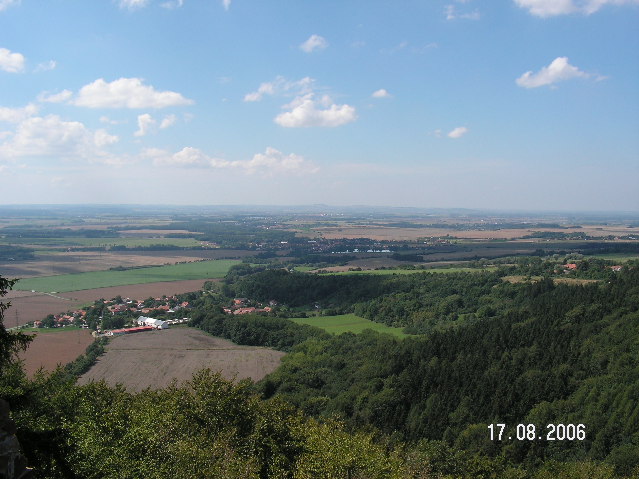 Pohled z hradu Lichnice k Ronovu nad Doubravou.